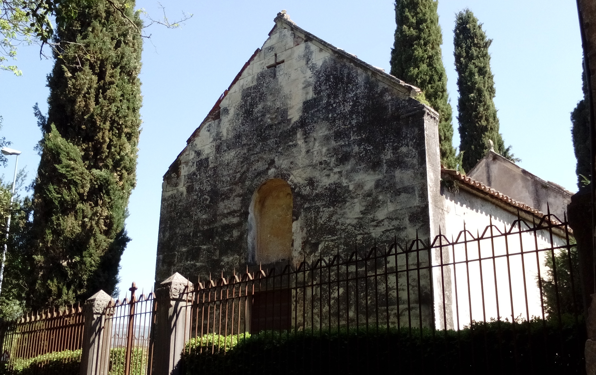 Facciata della chiesetta di Santa Sofia a Pedemonte, frazione di San Pietro in Cariano.